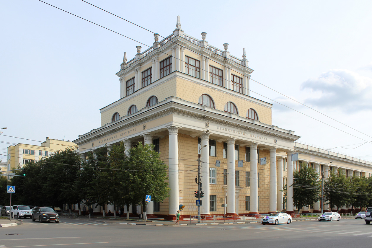 Медицинская академия в г. Иваново